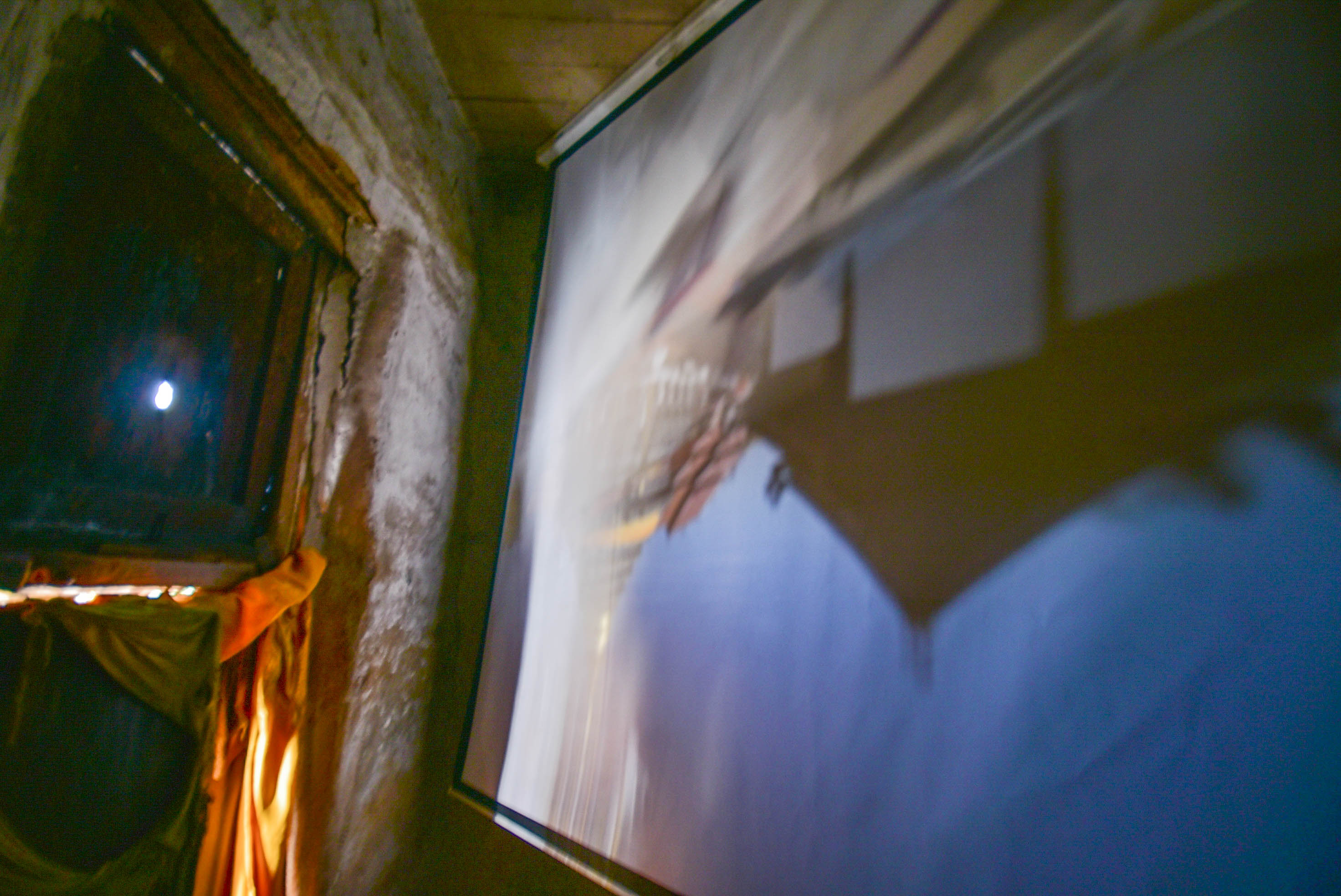 วัดพระธาตุลำปางหลวง